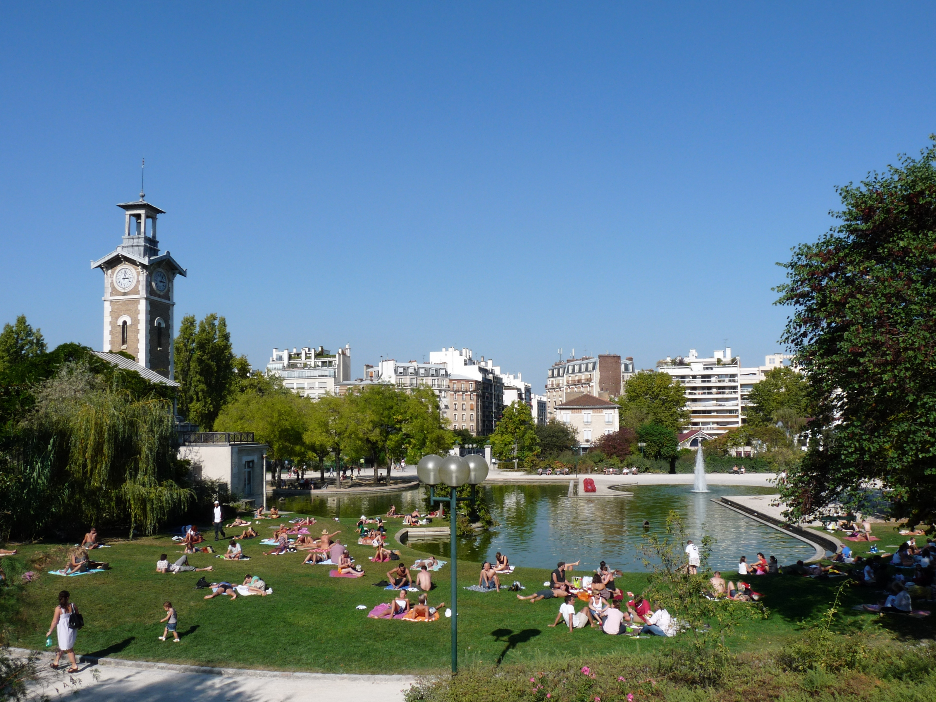 Dans le parc Georges Brassens à Paris